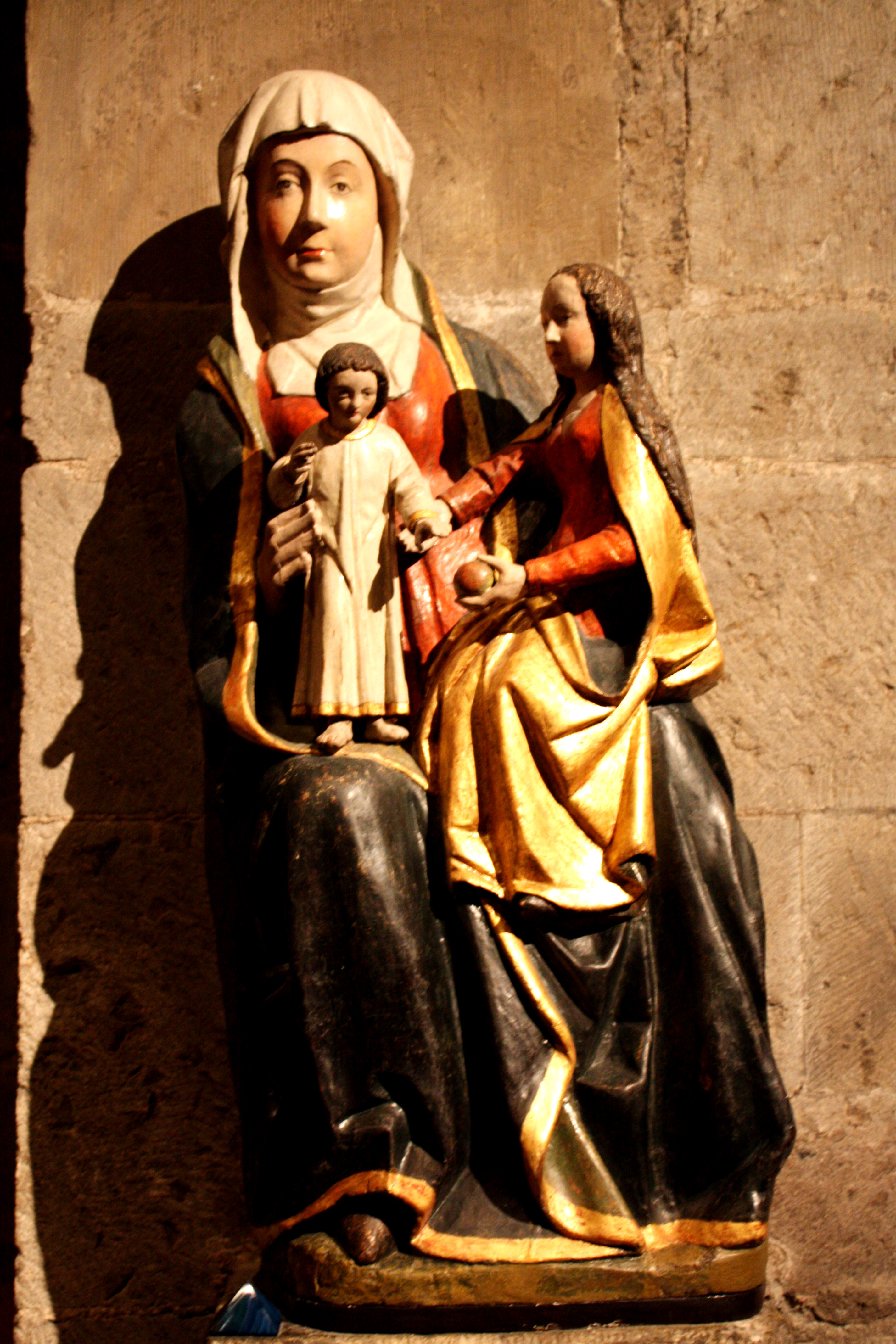 St-Kolumba Köln, Skulptur einer Anna Selbdritt um 1500